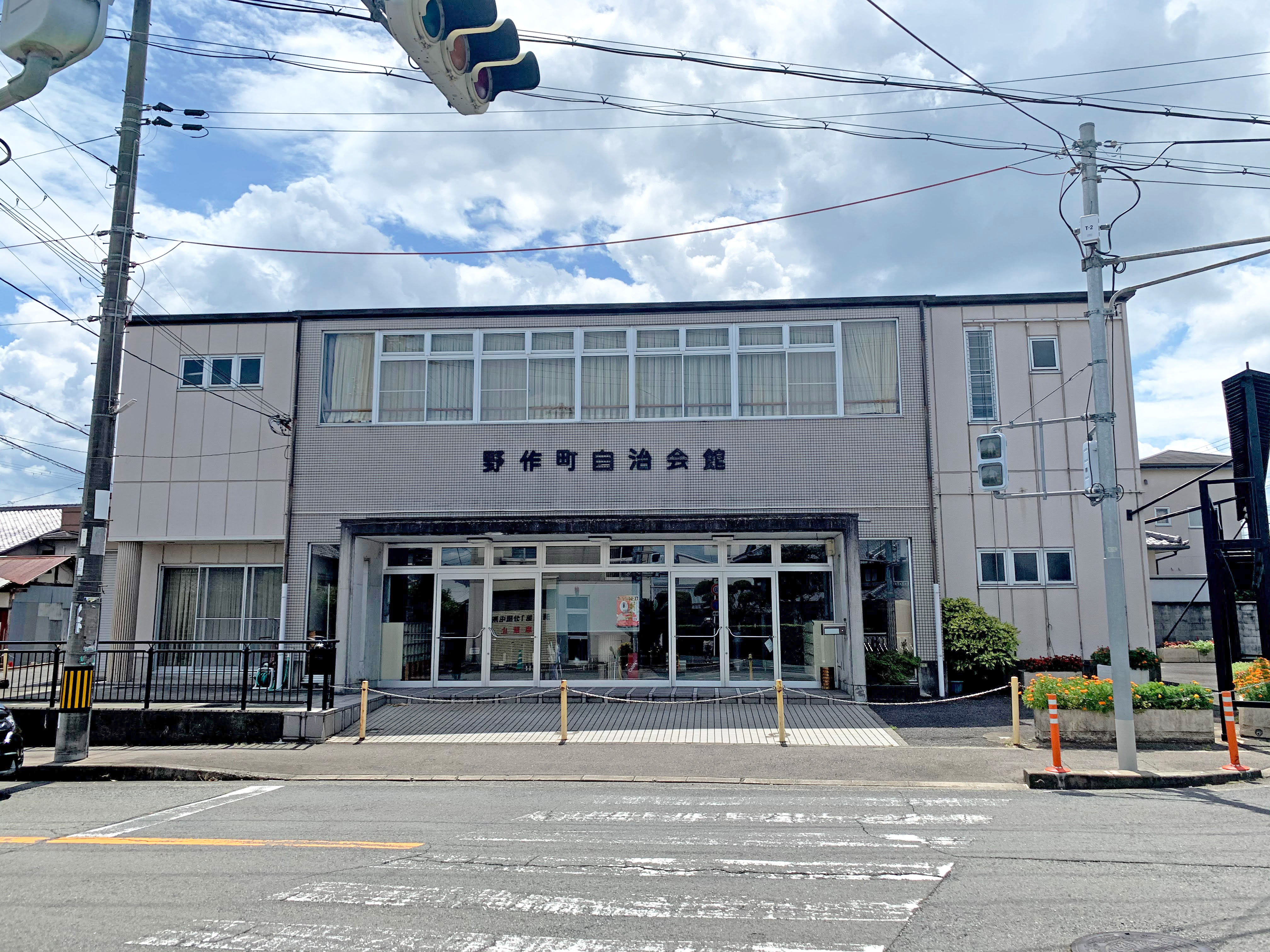 野作町 自治会館 外観（河内長野市野作町）